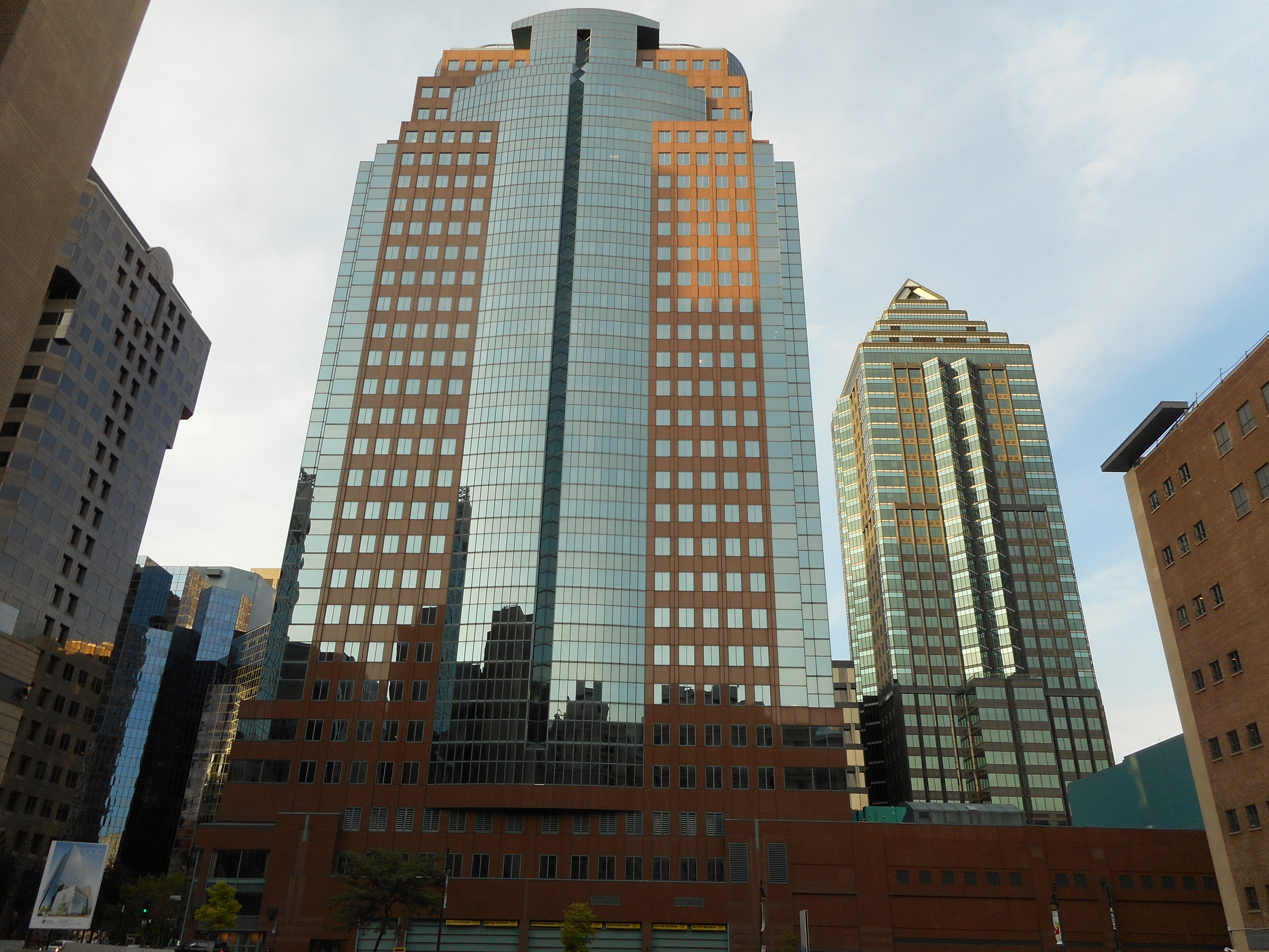 Édifices vus de la rue Metcalfe, à Montréal. À gauche : Tour Bell Media (Maison Astral), 1800 avenue McGill College À droite : 1501 McGill College